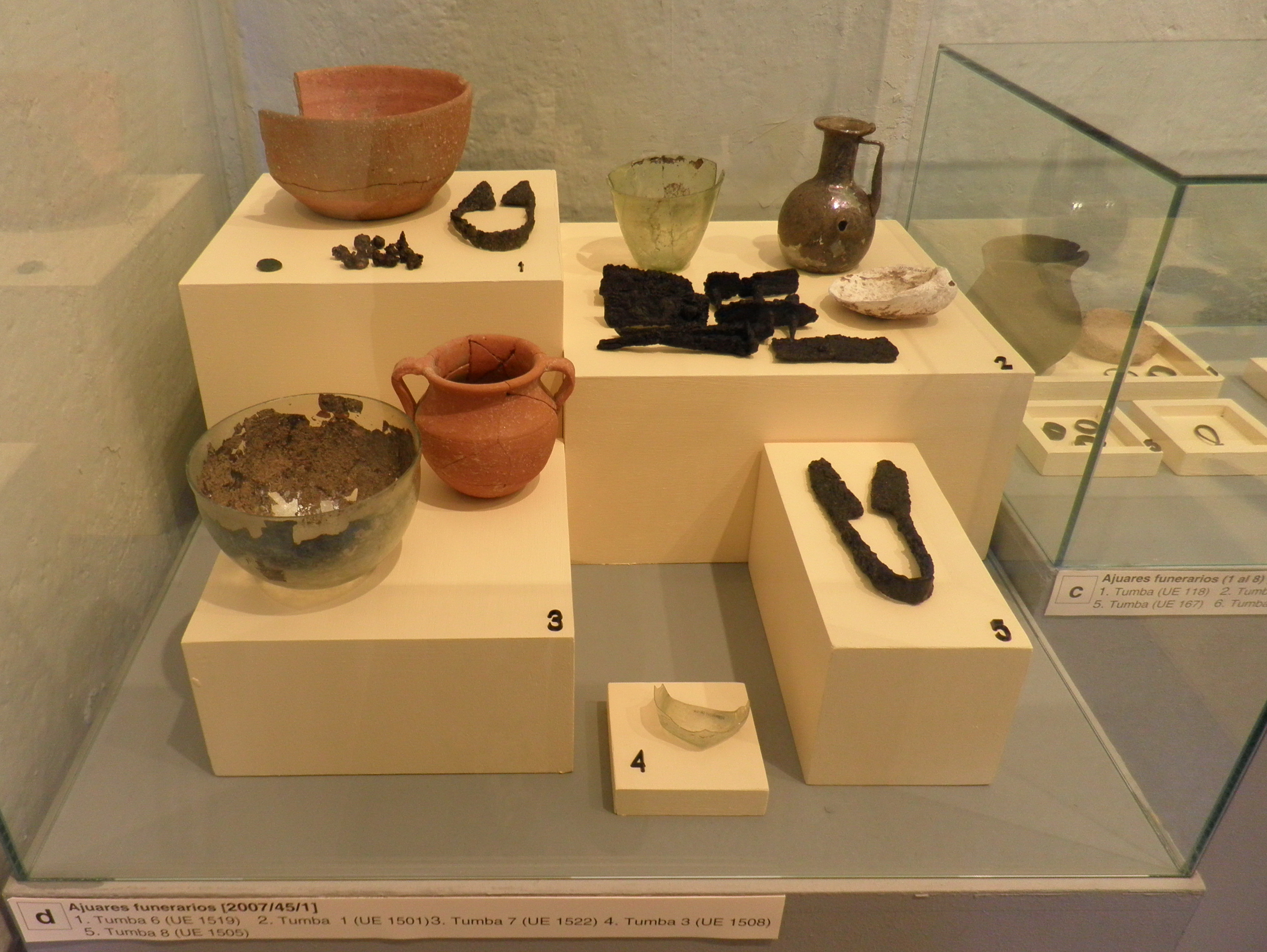 Ajuares funerarios procedentes de las excavaciones en la necrópolis tardorromana